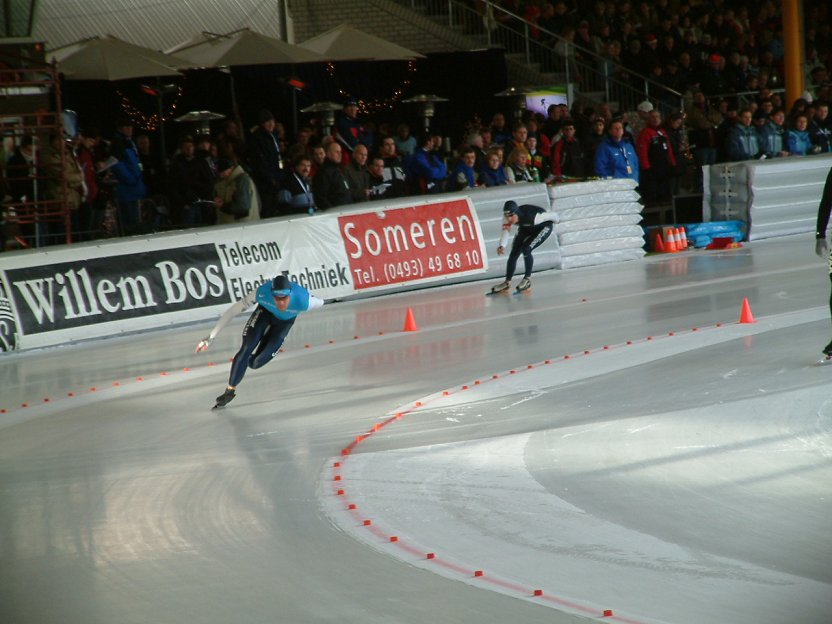 Gianni Romme tegen Bob de Jong tijdens het NK Allround 2004 in het IJssportcentrum in Eindhoven